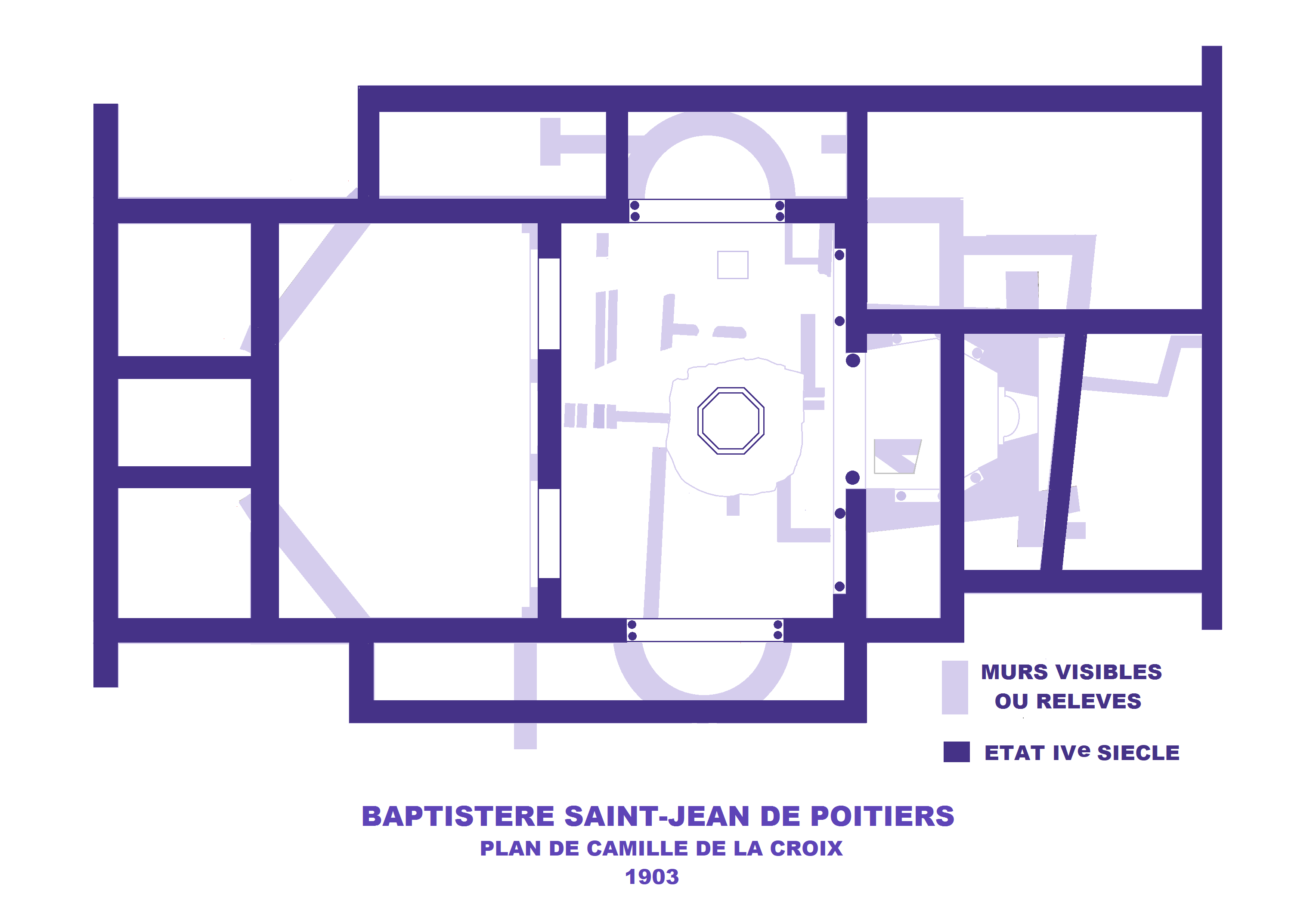 Baptistère de Poitiers, Plan de Camille De La Croix, 1903